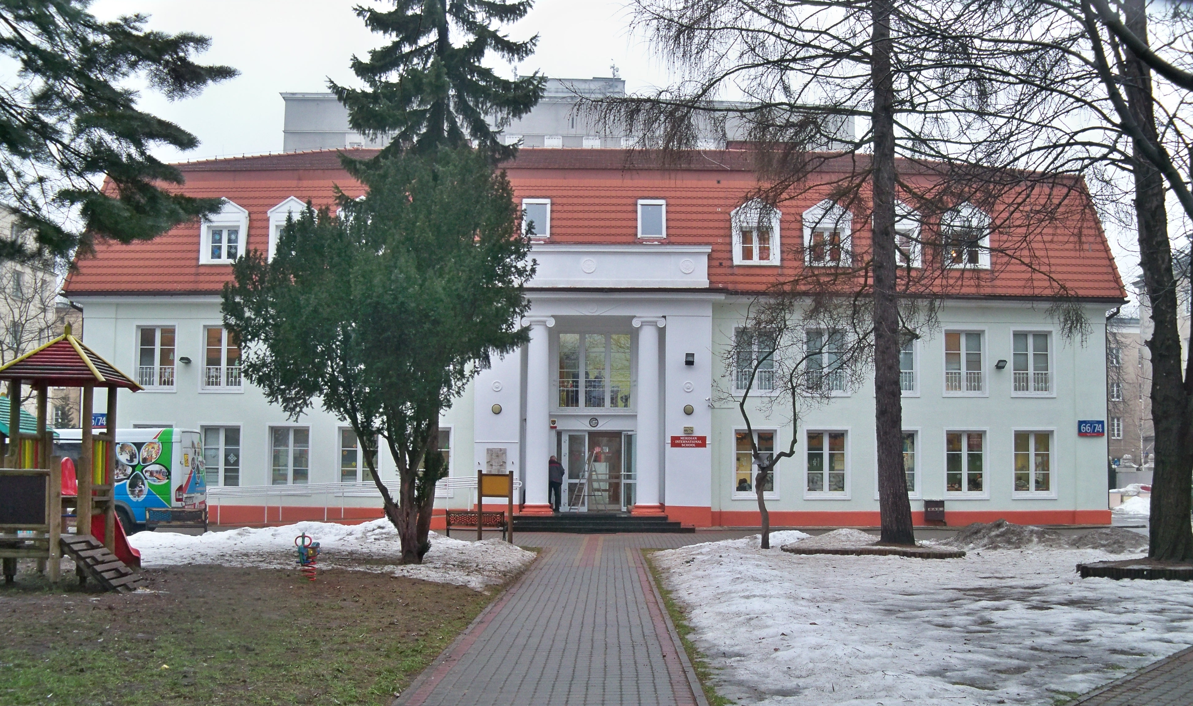 Międzynarodowa Szkoła Podstawowa Meridian, ul.Wawelska 66/74 w Warszawie